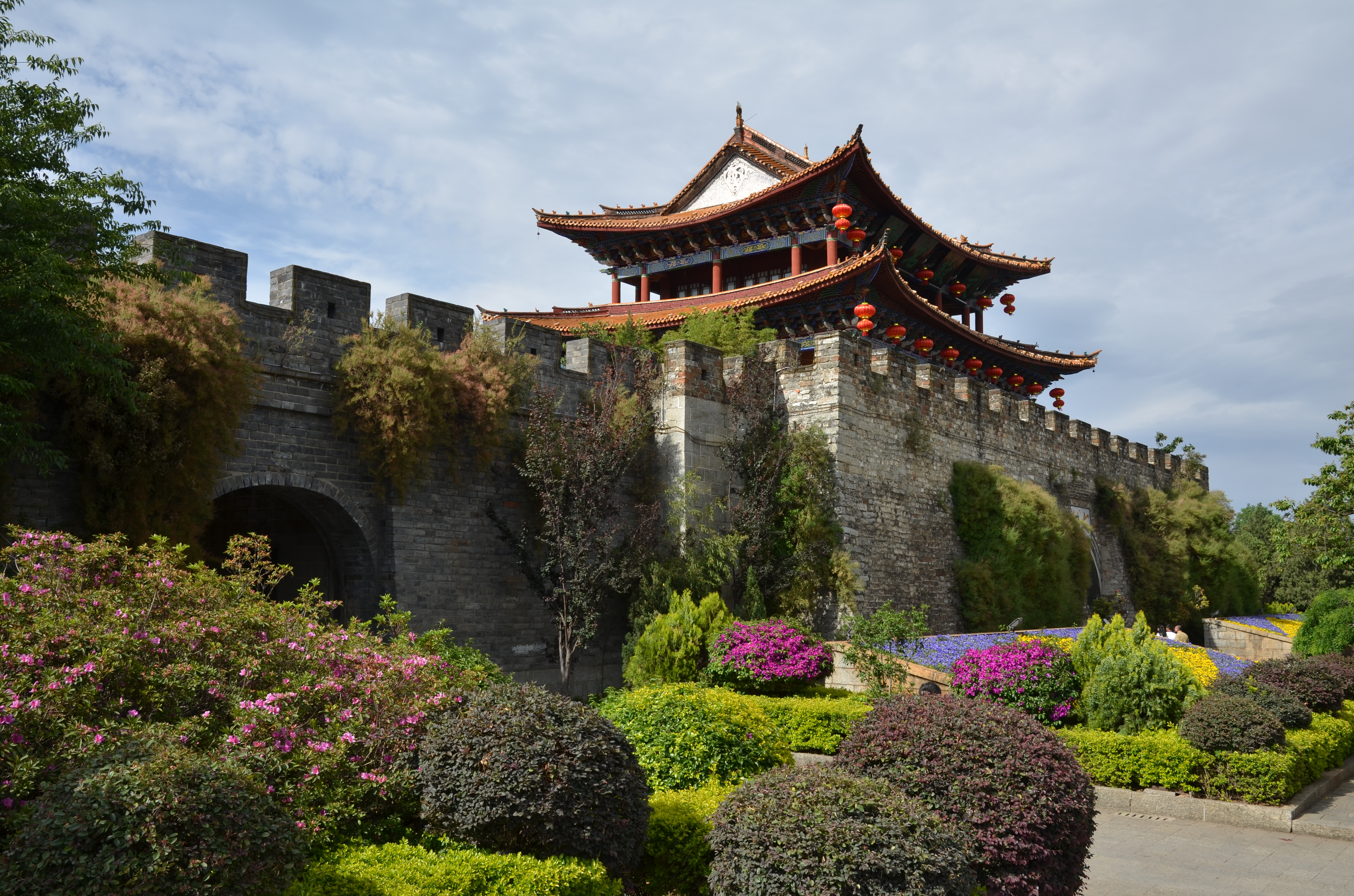 Dali - hradby starého města